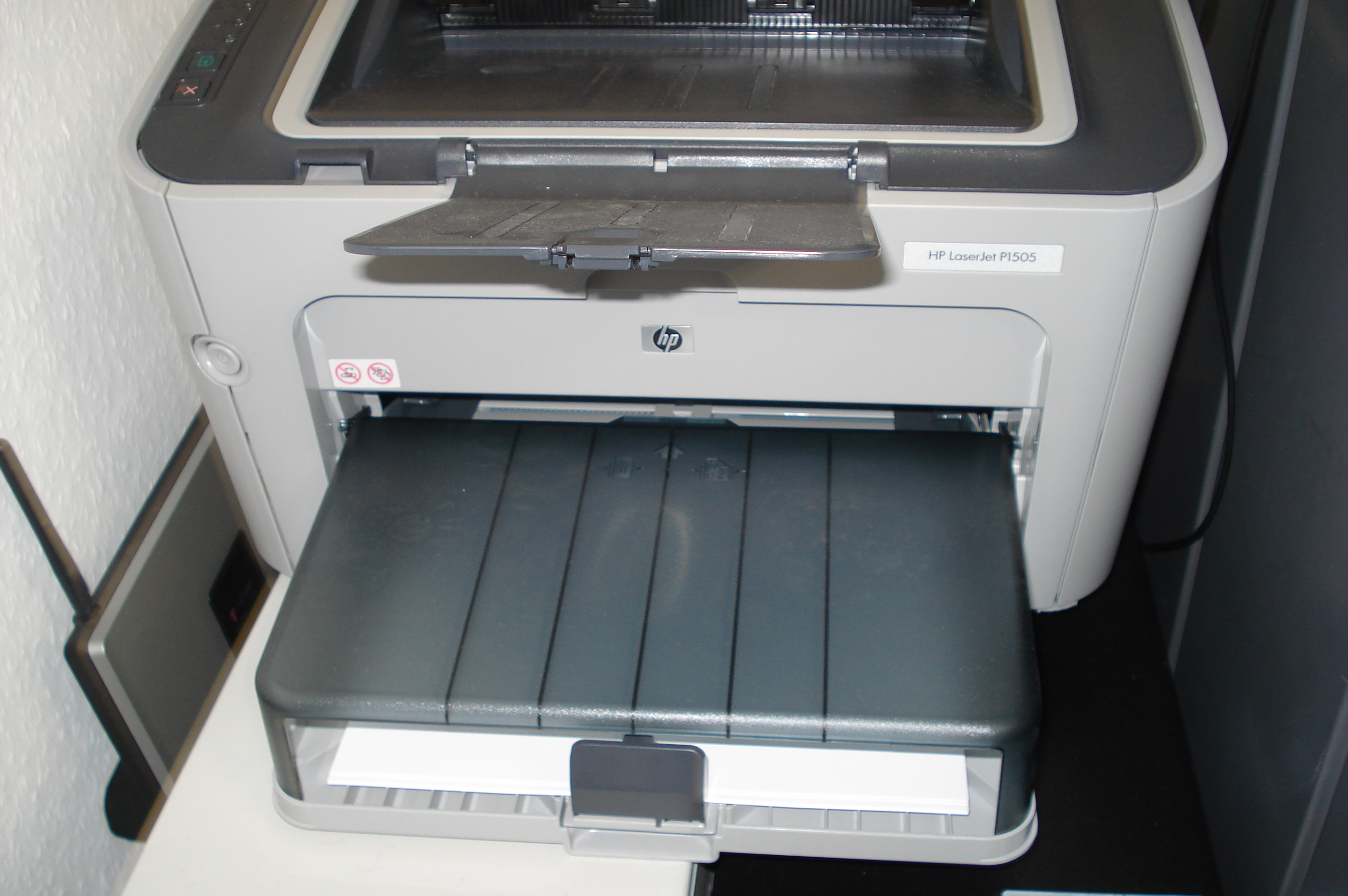 Laserdrucker der Marke HP.